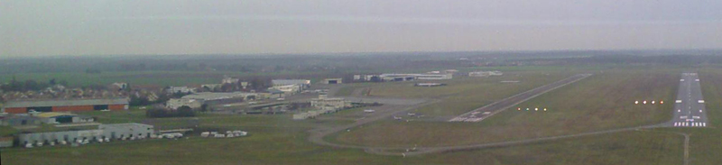 Vue générale de l'aérodrome de Toussus-le-Noble depuis la finale 25